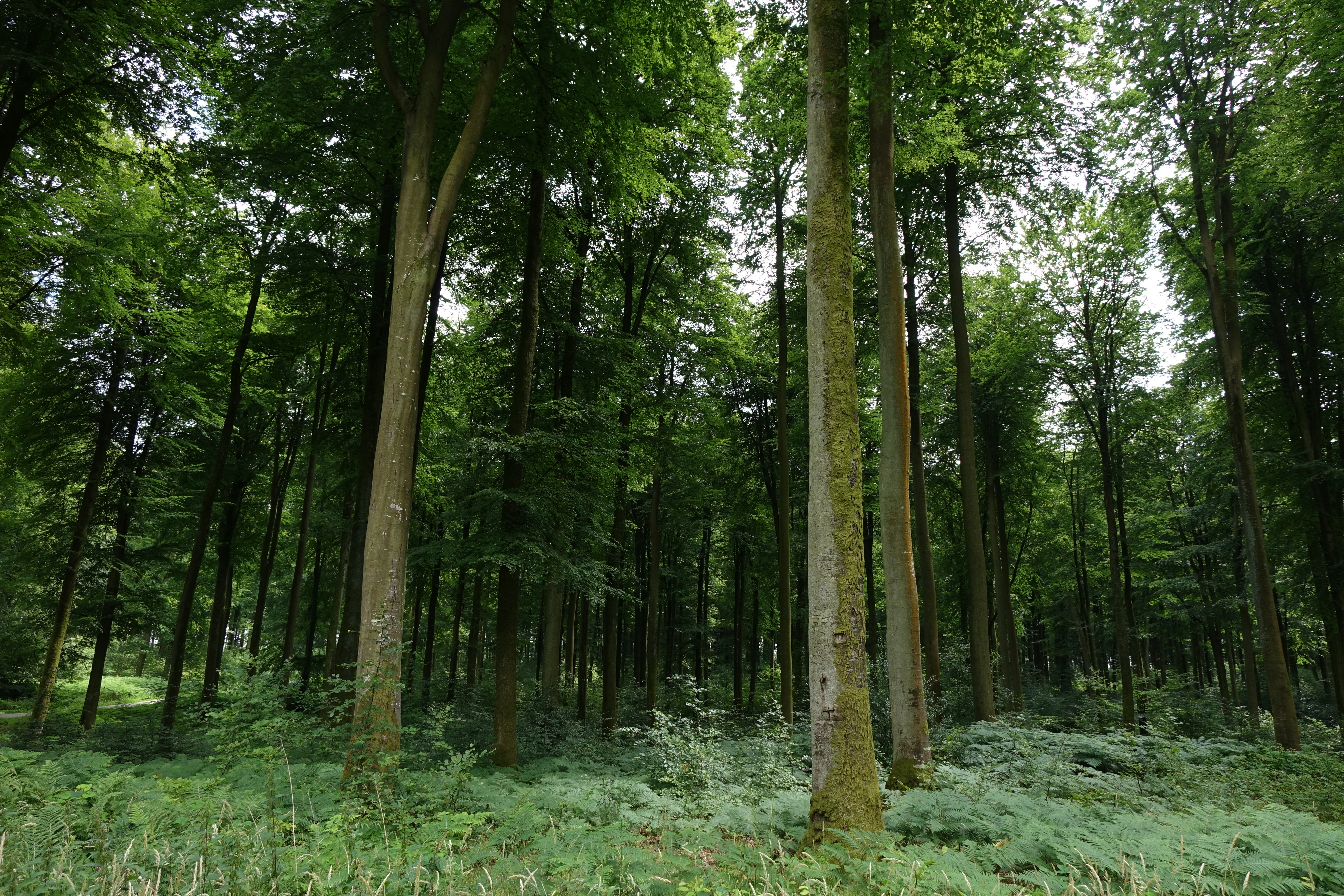 Hétraie en forêt d'Eawy, Seine-Maritime, France